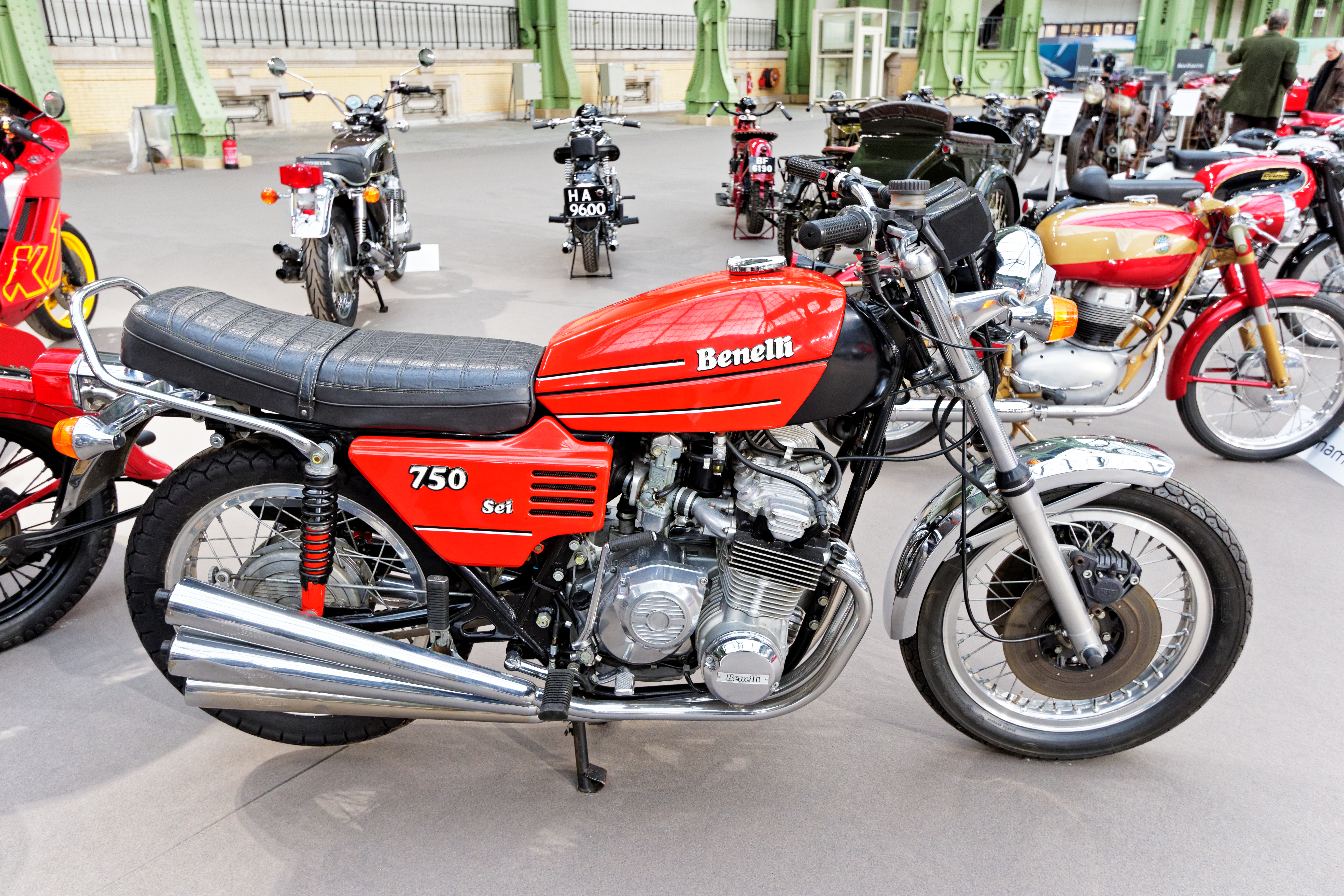 Un des véhicules présenté lors de la vente aux enchères Bonhams 2016 au Grand Palais de Paris.